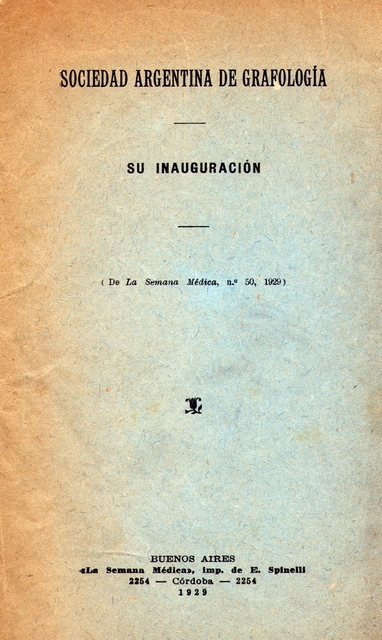 Separata de "La Semana Médica" publicando la inauguración de la Sociedad Argentina de Grafología. Ed. Spinelli, Buenos Aires, 1929.